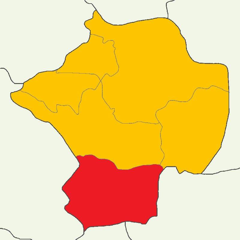 Niğde'de 2014 Türkiye cumhurbaşkanlığı seçimi sonuçları